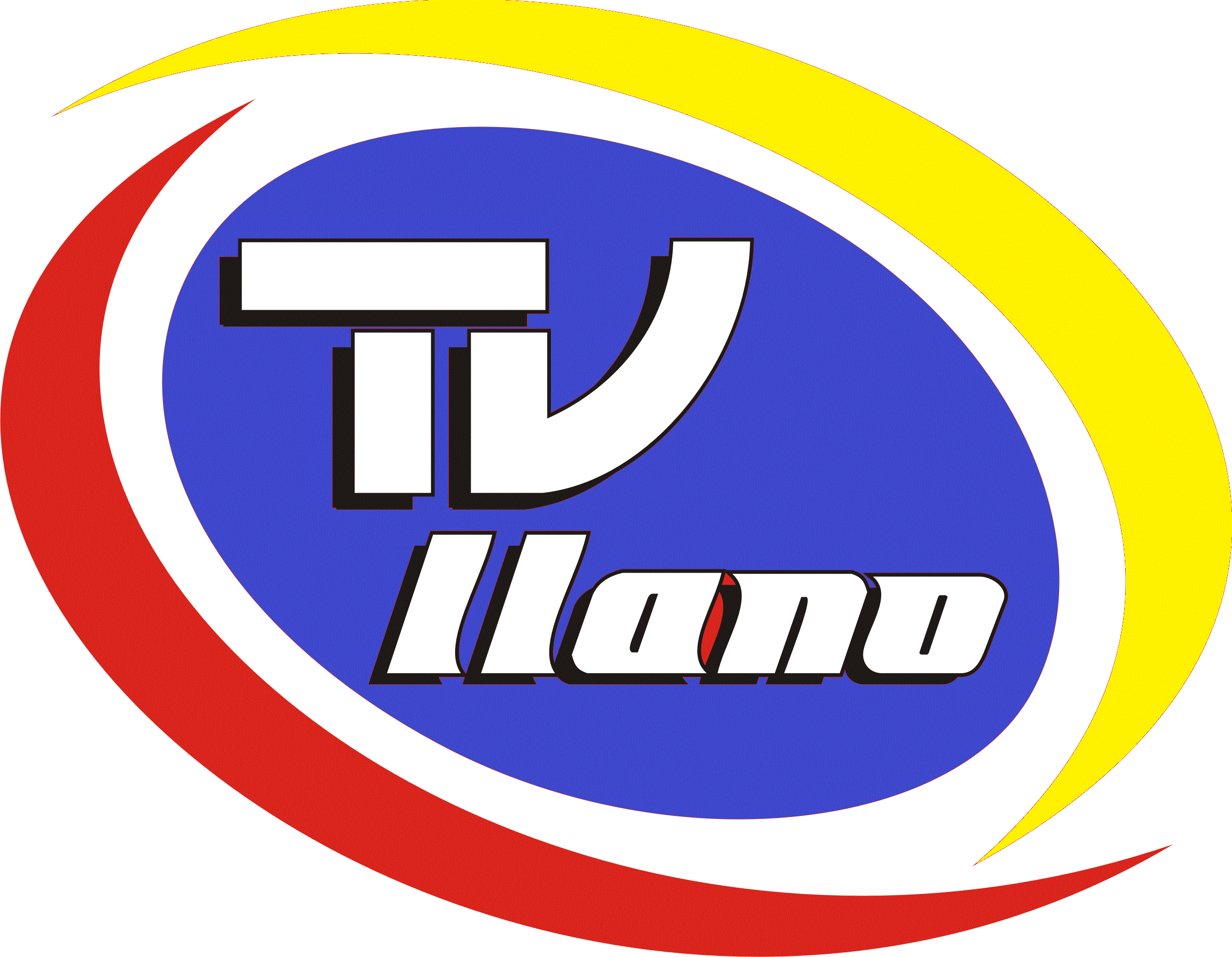 logo del canal